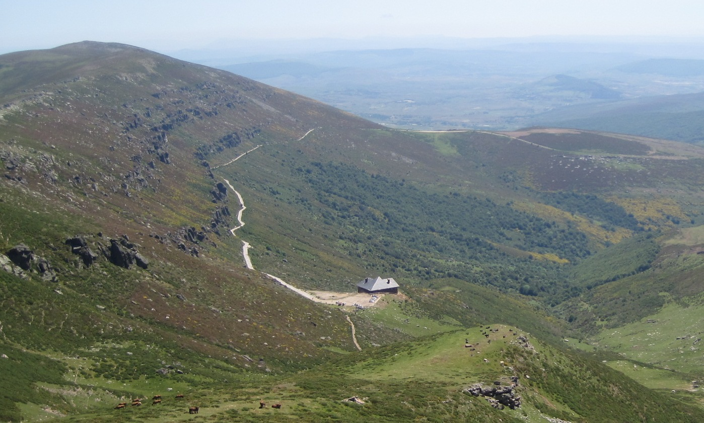 Carretera y refugio del Golobar, en la Montaña Palentina (España)